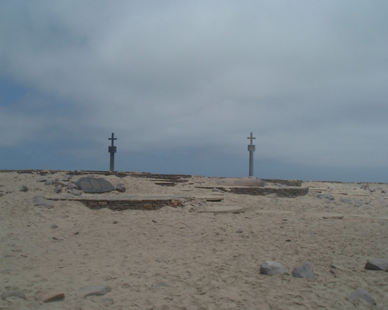 2 Steinkreuze auf Cape Cross